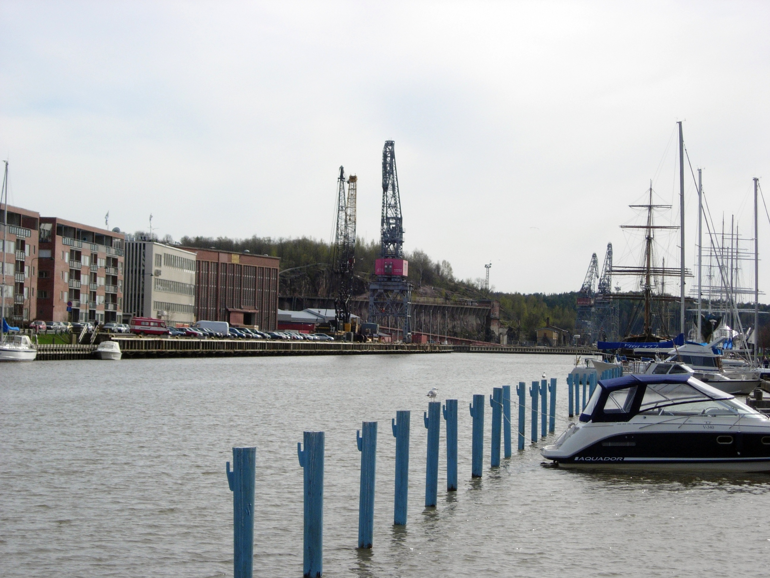 Takana Korppolaismäki ja sen edessä Wärstilän telakka-alue. Kuvassa näkyvät nosturit ovat suojeltuja.